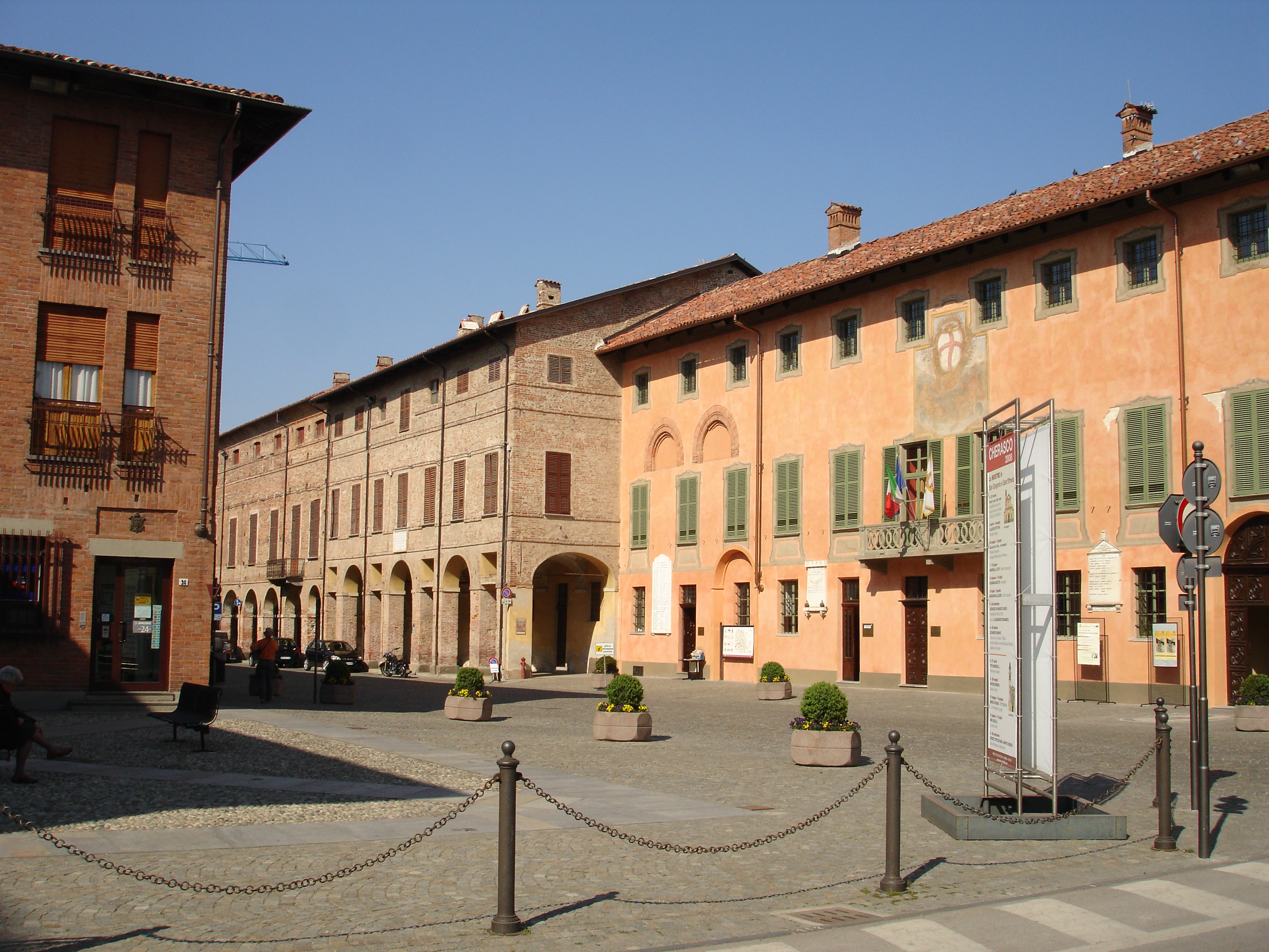 Cherasco (Cuneo): municipio e piazza antistante